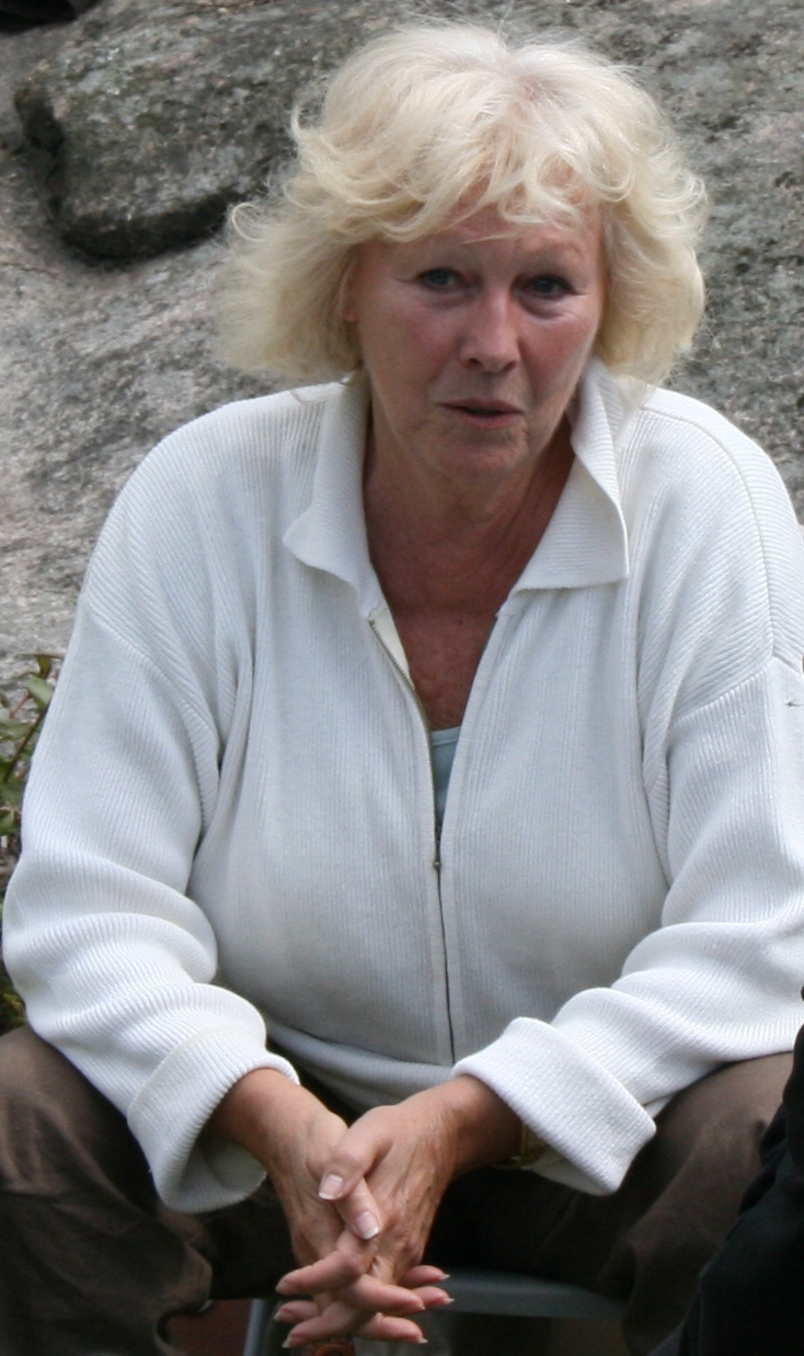 Lise Fjeldstad (født 1939), norsk skuespiller